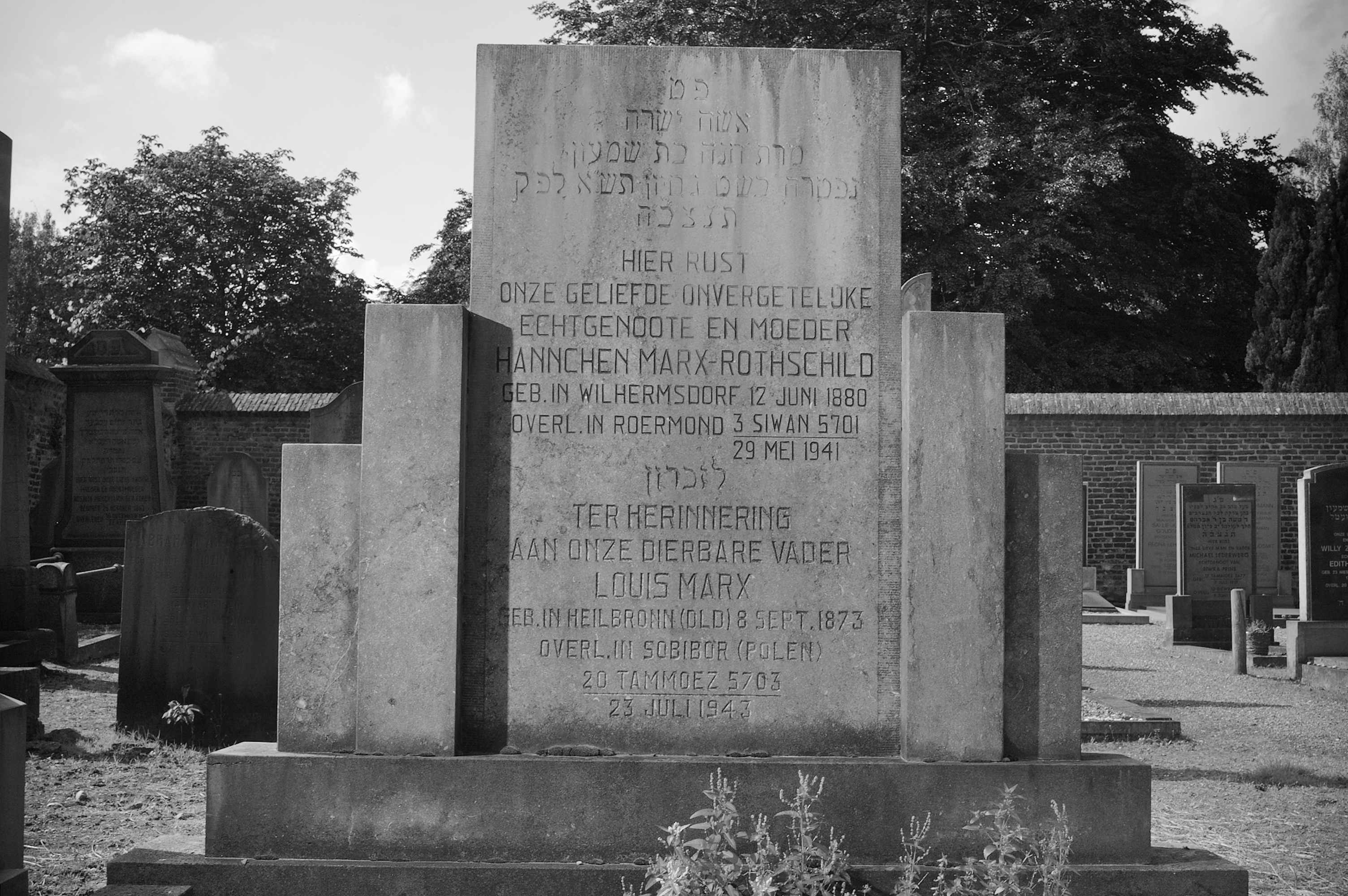 Grabstein von Hannchen und Louis Marx auf dem Oude kerkhof (nieuwe deel) in Roermond, Niederlande